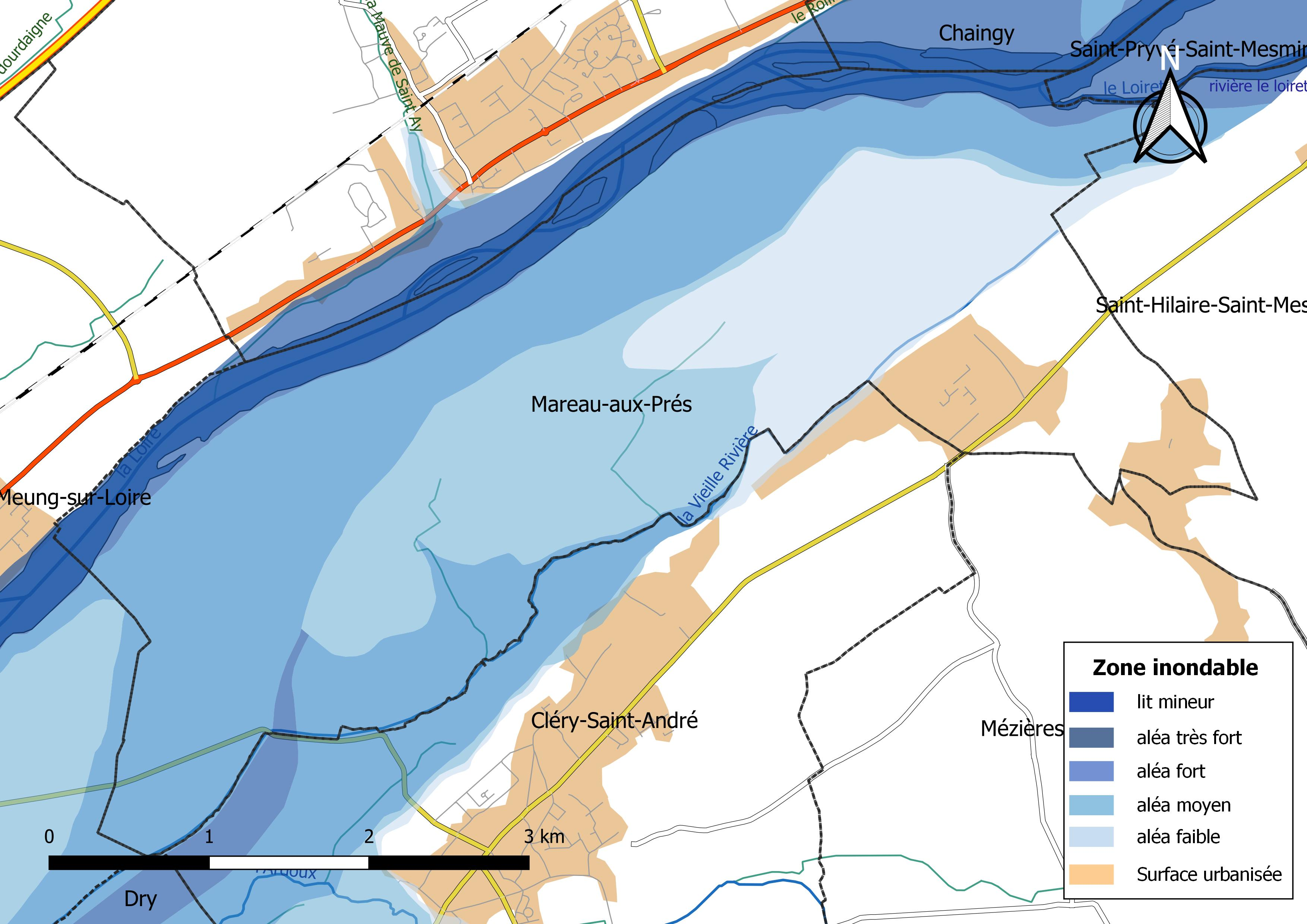 Zone inondable et réseaux hydrographique et routier de la commune de Mareau-aux-Prés (Loiret, France).